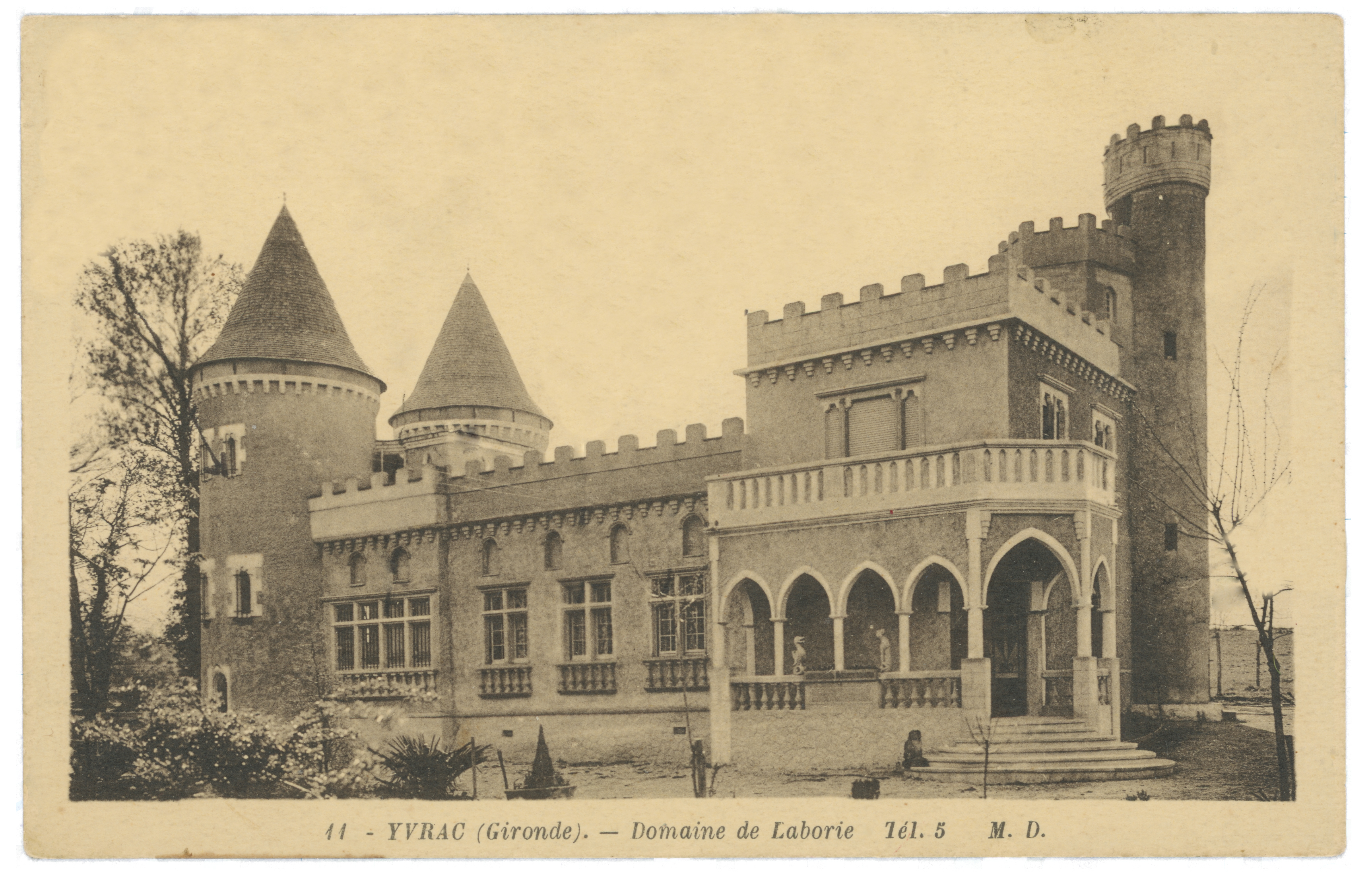 Résidence de Monsieur Anatole BLAISE